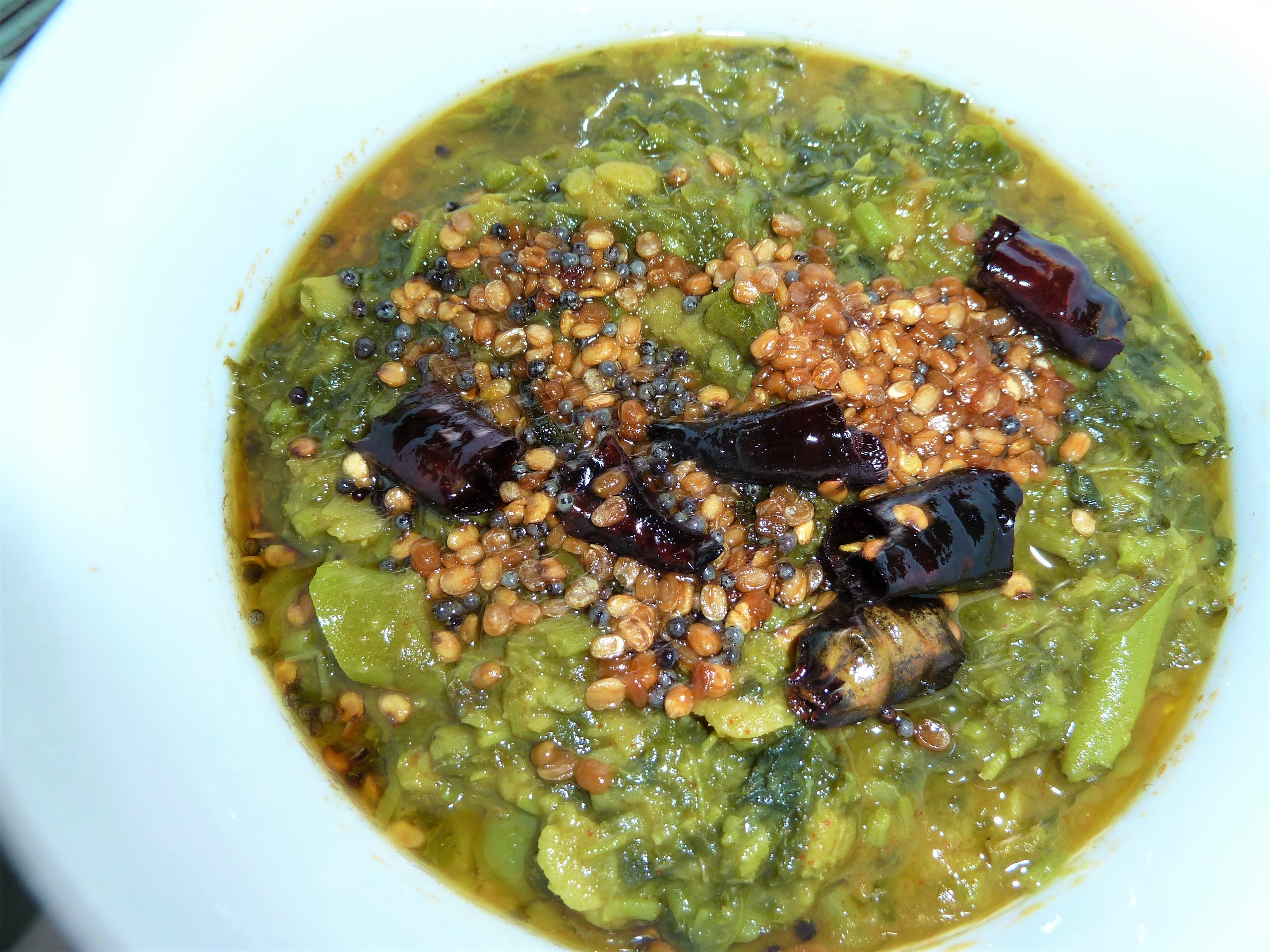 తోటకూర పప్పు